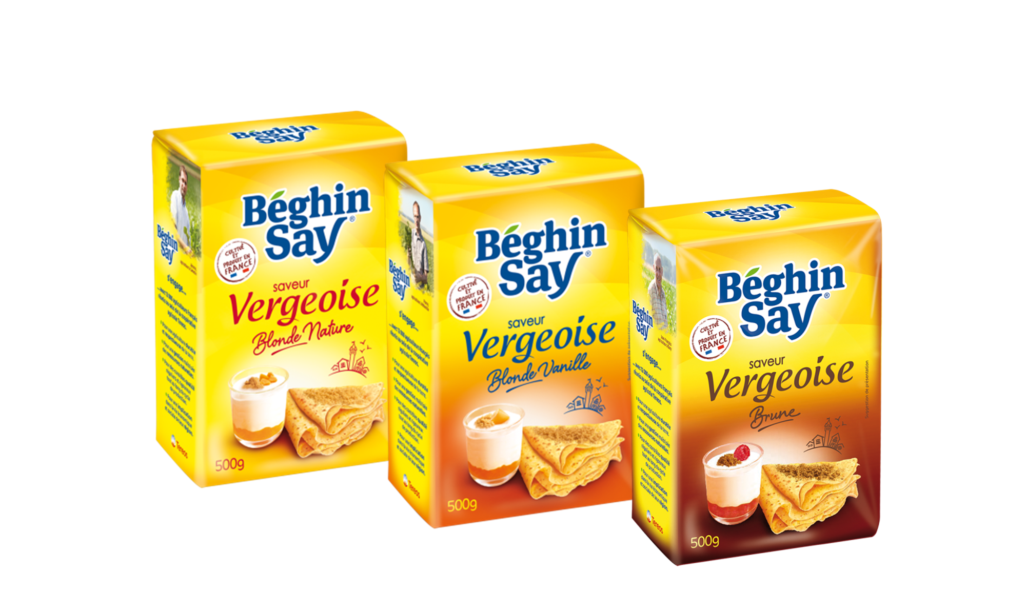 Trois sachets saveur vergeoise blonde nature, blonde vanille et brune Béghin Say.